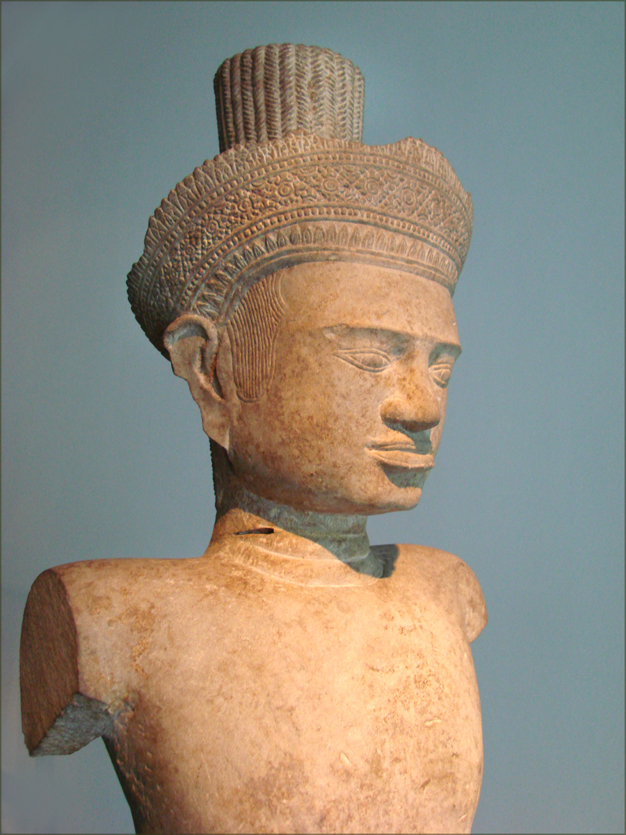 Buste de Vishnu (partie supérieure de l'oeuvre exposée) Cambodge, début du XIIe siècle, Règne de Surya Varman II, grès musée des arts asiatiques __________ Le musée, inauguré en 1998, a été conçu par l'architecte japonais Kenzo Tange (1913-2005) au sein du parc Phoenix à Nice (le parc Phoenix est un parc floral situé près de l'aéroport). L'initiative de cette construction remonte à l'époque de Jacques Médecin (1928-1998) , maire de Nice de 1966 à 1990 qui souhaitait y exposer des oeuvres de Pierre-Yves Trémois et des pièces d'art asiatique que l'artiste se proposait de donner à la ville de Nice. C'est P.-Y. Trémois qui aurait incité les responsables politiques à choisir ce célèbre architecte plutôt qu'un architecte local. En raison de la fuite à l'étranger de Jacques Médecin et de sa condamnation pour corruption, le projet initial a été abandonné et l'édifice est resté inoccupé durant plusieurs années. Le projet a été par la suite transformé par le conseil général des Alpes maritimes en musée des arts asiatiques, avec le soutien de la direction des musées de France et le concours du musée Guimet. Le premier conservateur du musée Marie-Pierre Foissy-Aufrère a brillamment relevé le défi de faire un musée évoquant les grandes civilisations asiatiques, de l'antiquité à aujourd'hui, dans un espace certes exceptionnel mais extrêmement exiguë. ___________________ "Le plan du musée repose sur deux formes géométriques fondamentales de la tradition japonaise; le carré, symbole de la terre,et le cercle, symbole du ciel....." Kenzô Tange site officiel article de Wikiipedia sur l'architecte